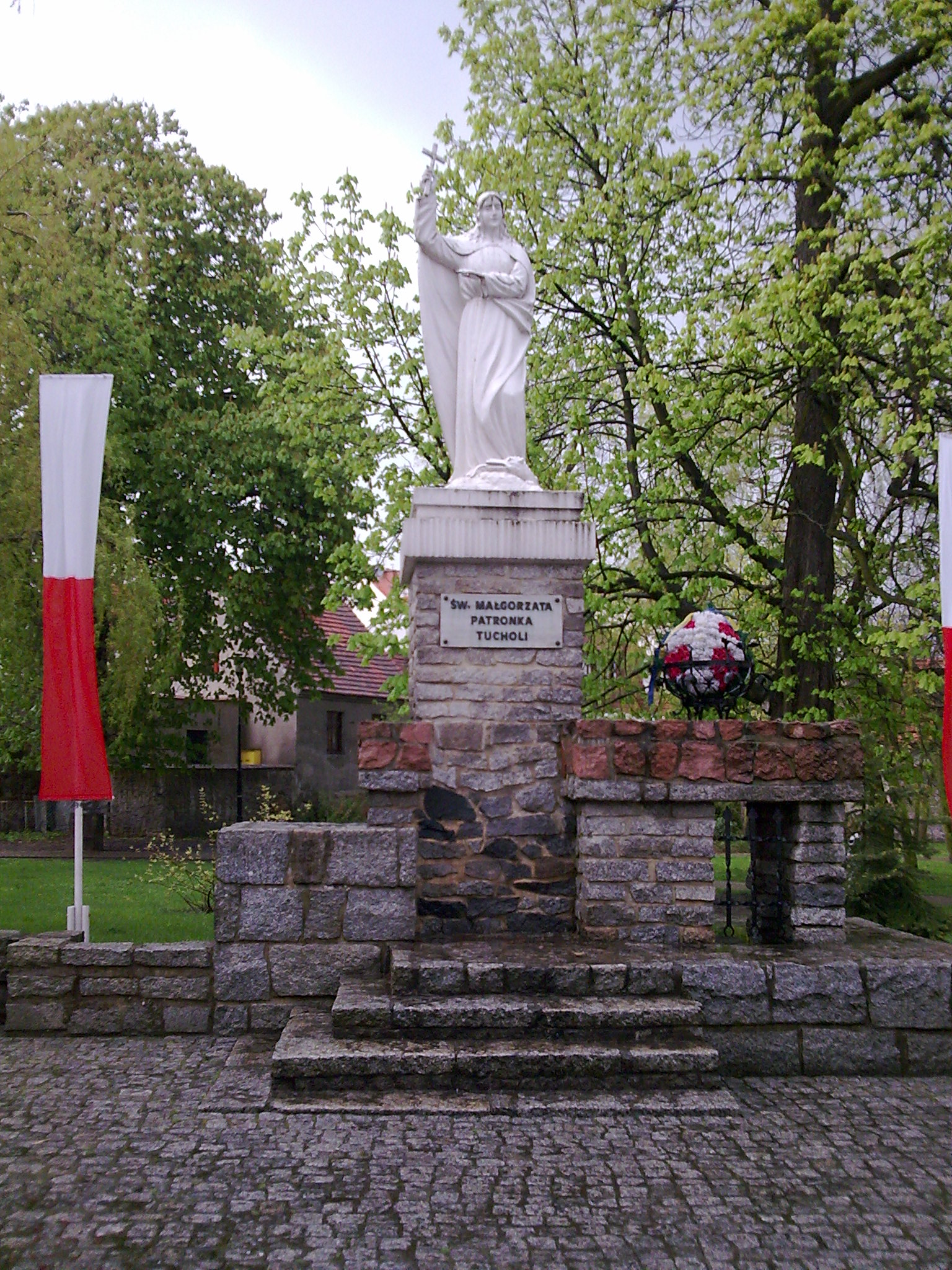 Skwer Św. Małgorzaty - pomnik patronki miasta Tuchola